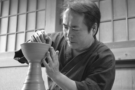 陶芸家 山岡徹